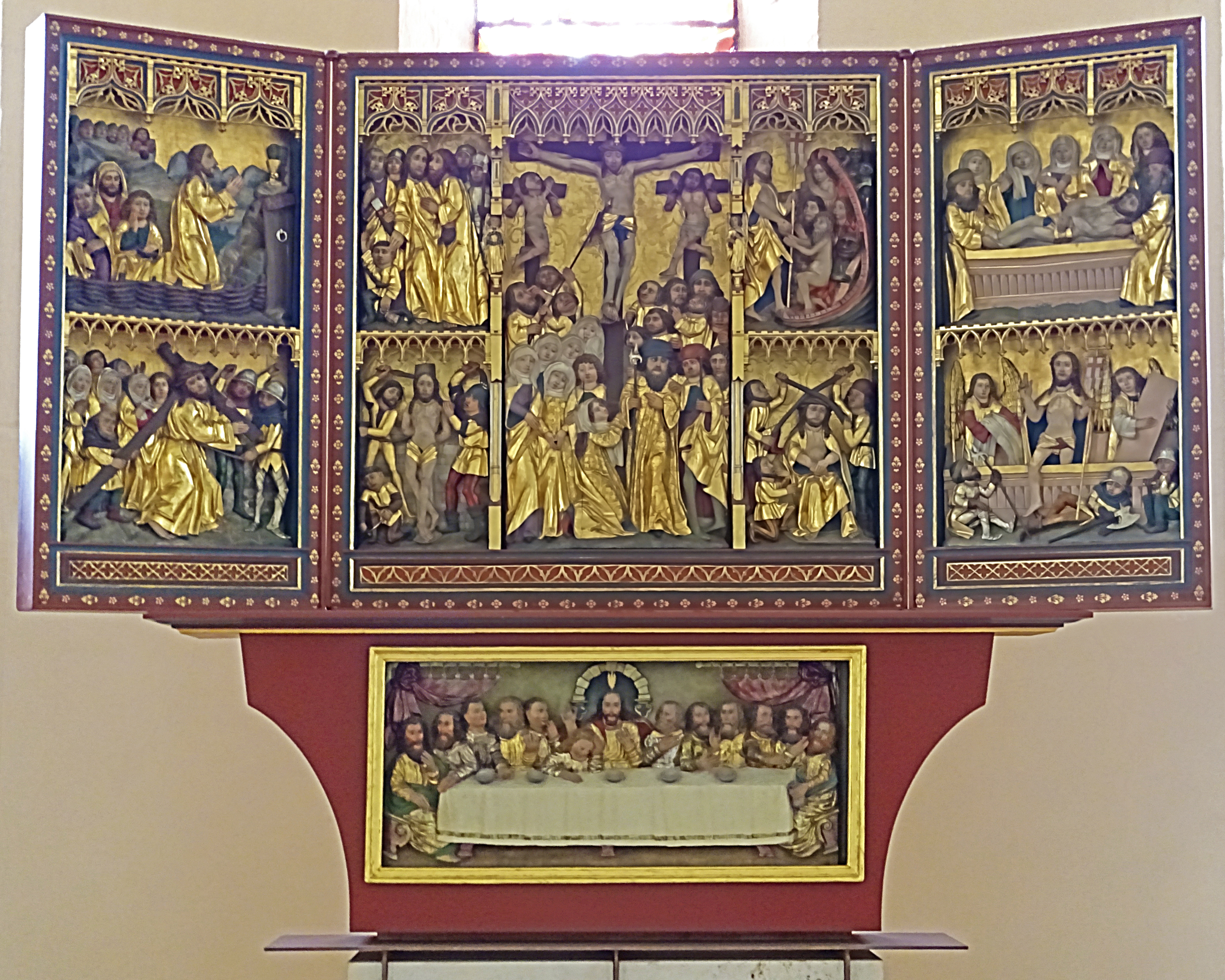 Flügelaltar (1475) aus dem Inventar des 1525 zerstörten Zisterzienserinnenklosters in St. Nikolaus (Worbis), Festtagsseite